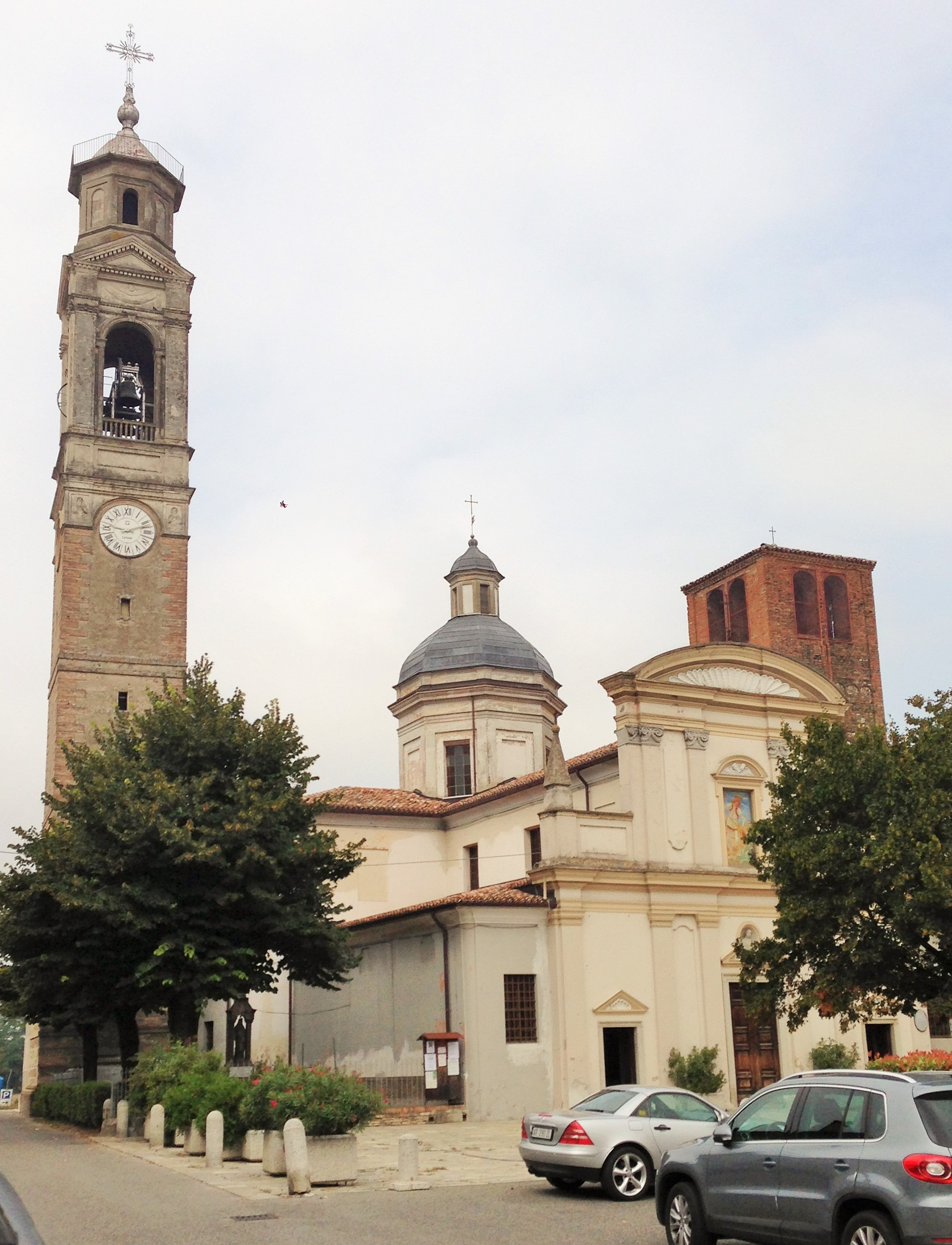 Iglesia entre Piacenza y Fiorenzuola d'Arda